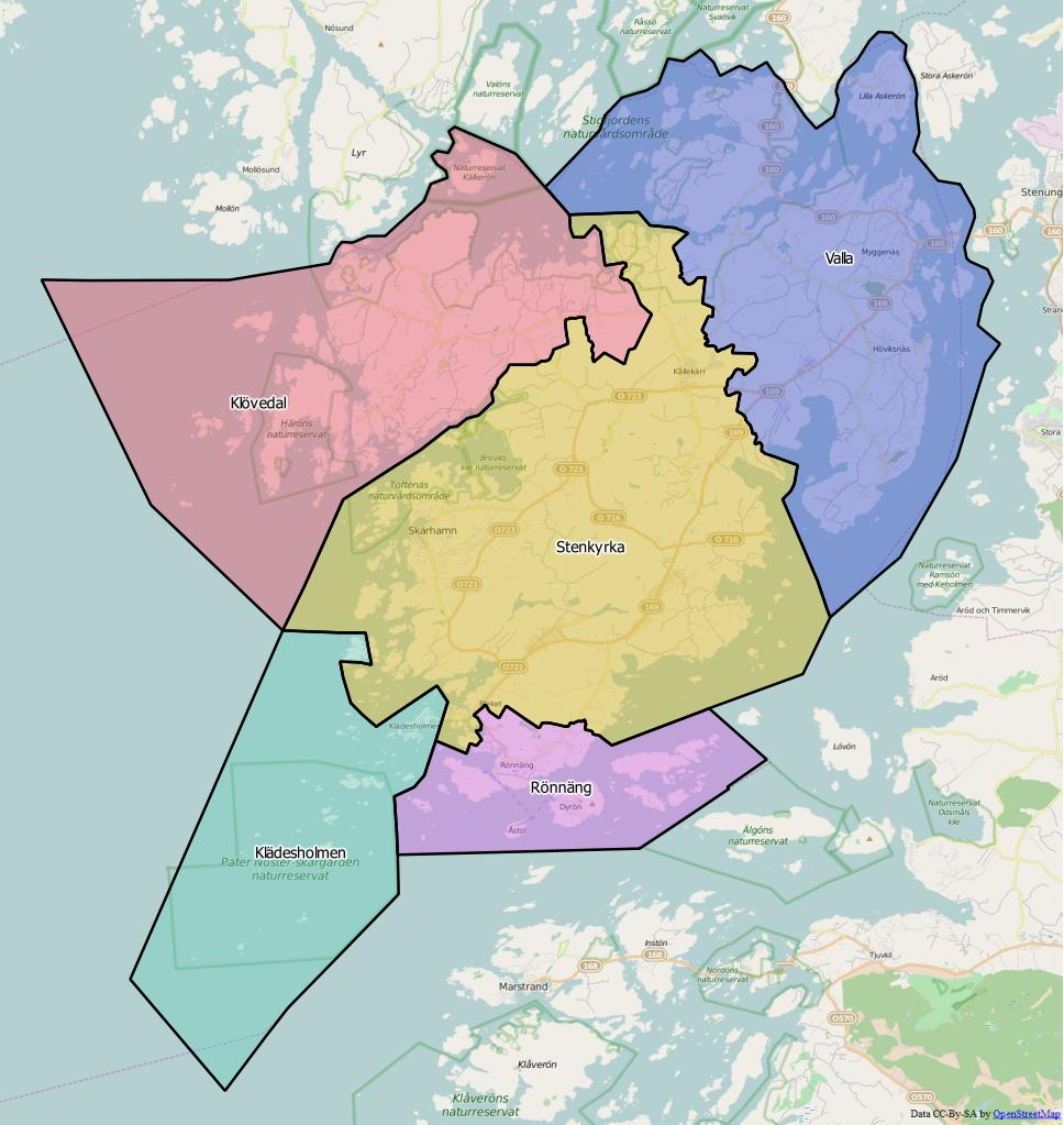 Distriktsindelningen i Tibro kommun World file: 53.01728376638206441 0 0 -53.01728376638206441 1264821.51260046102106571 7991101.8451388031244278